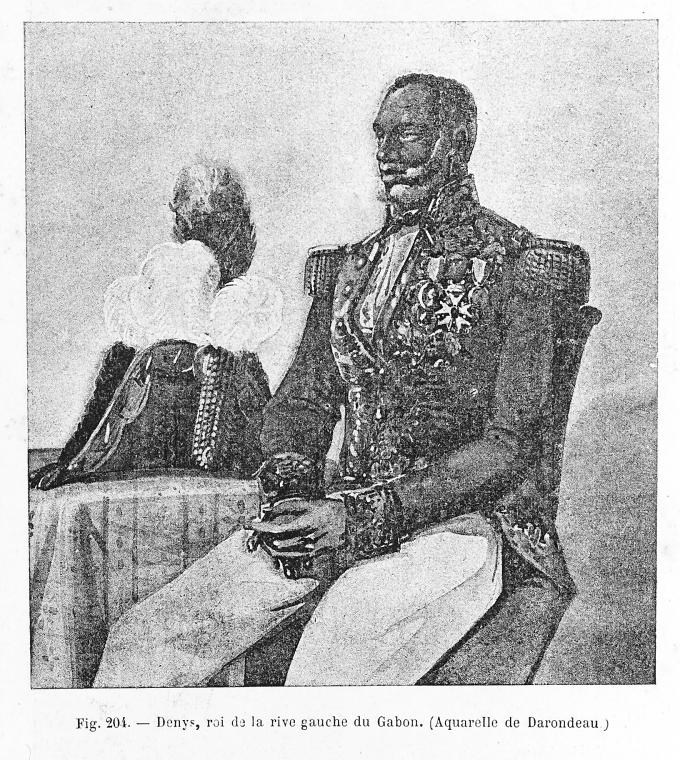 Denys, roi de la rive gauche du Gabon (aquarelle de Darondeau), in Côte occidentale d'Afrique : vues, scènes, croquis, p. 368, Colonel Frey